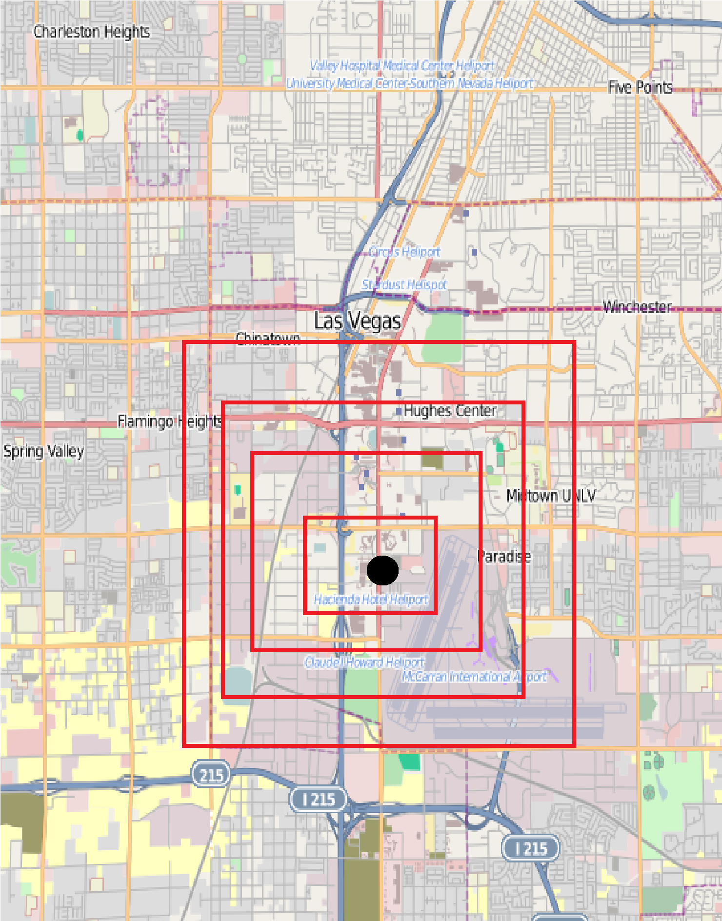 Las Vegas Strip shooting